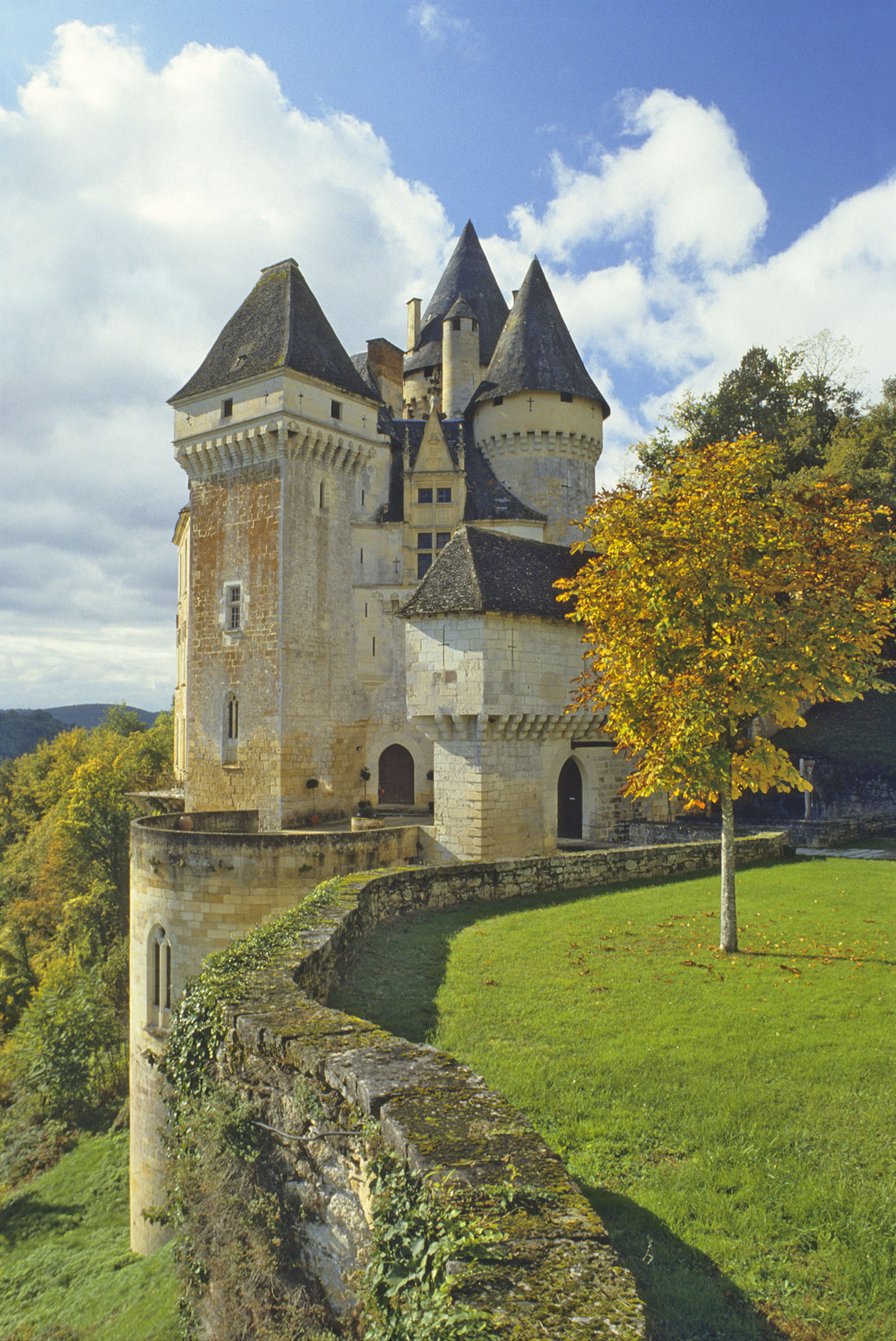 Les chateaux et manoirs du Perigord, le chateau de La Roque en Perigord noir, ici vue d’ensemble N.E. en automne, le chateau est bati a mi coteau au-dessus d’un vallon au N.E. de Saint-Cyprien, juchee a l’extremite d’une etroite terrasse la construction s’est developpee en hauteur ce qui lui confere sa silhouette massive et imposante, les Beaumont-Beynac vendirent le chateau en 1948, il a depuis lors connu divers proprietaires et fut du XVIIIe siecle jusqu’a nos jours incessamment remanie, embelli, modernise et amenage en residence confortable, on a heureusement preserve le remarquable ensemble de fresques decorant l’oratoire, edifice protege au titre des monuments historiques, photo prise apres avoir obtenu l’autorisation du proprietaire, commune de Meyrals, Dordogne, France, Europe. .